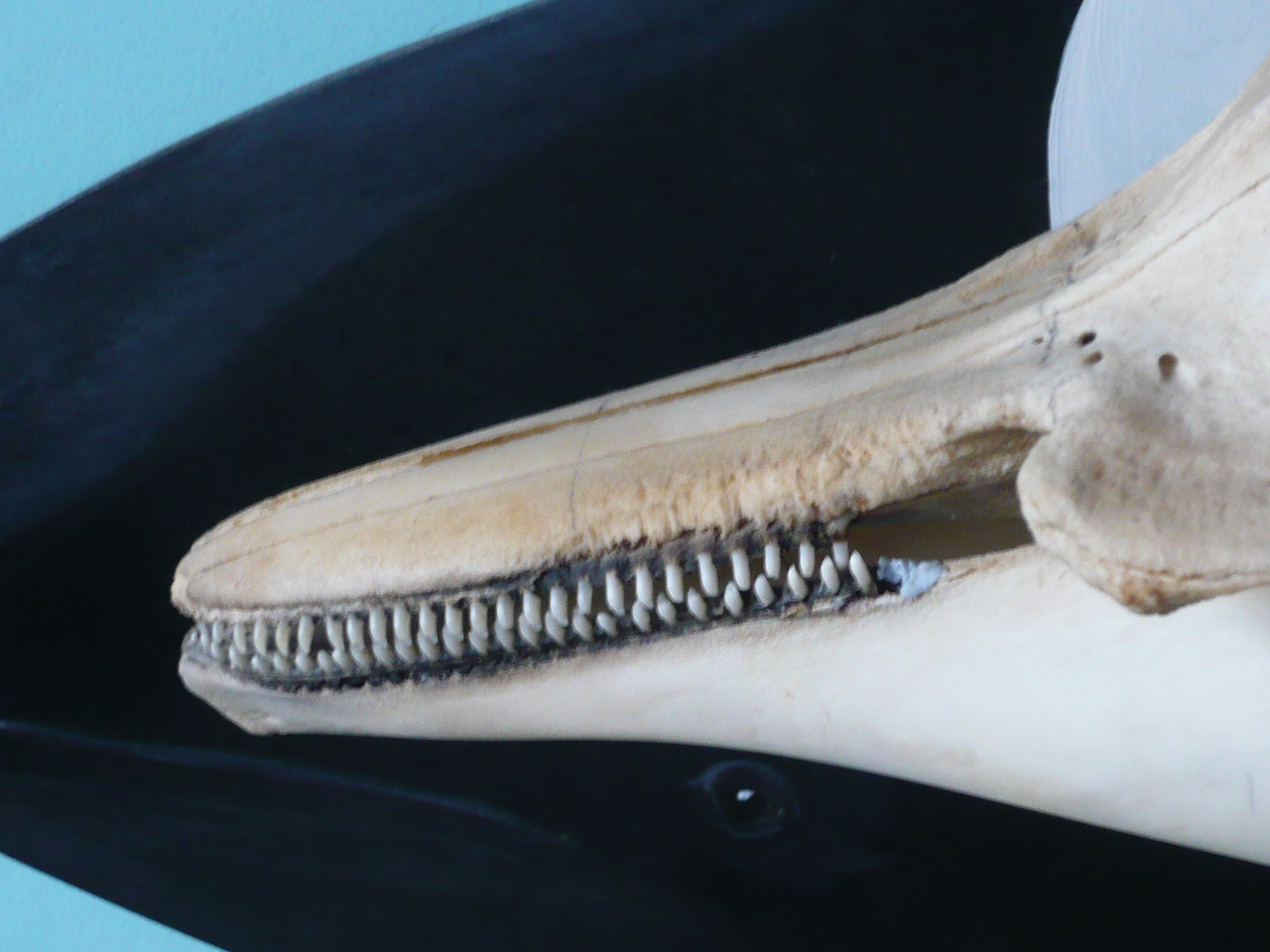 Rostre crânien, détail dentition partie gauche